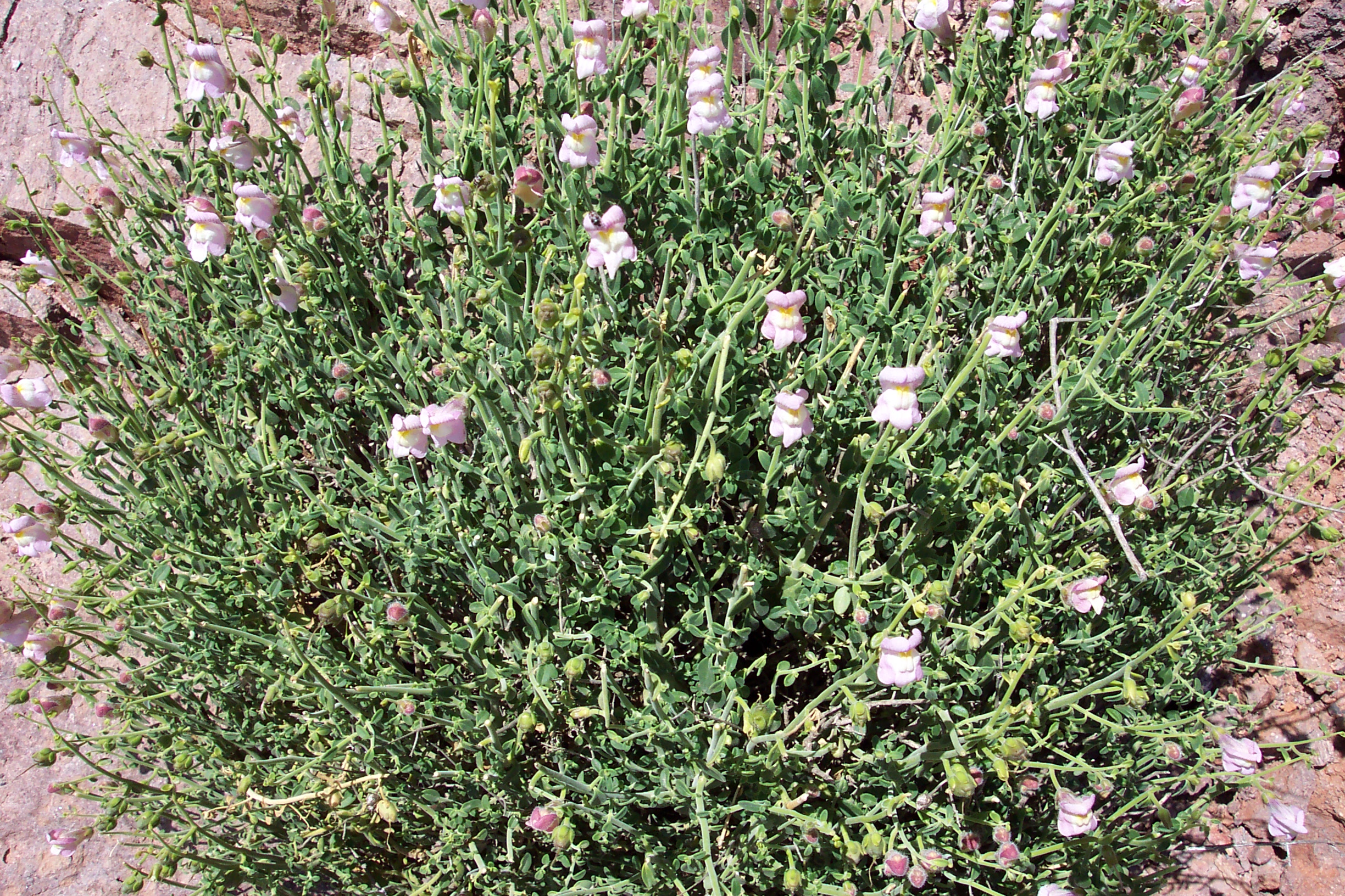 Fotografía de dragoncillo de Cabo de Gata, endemismo de Almería (España).